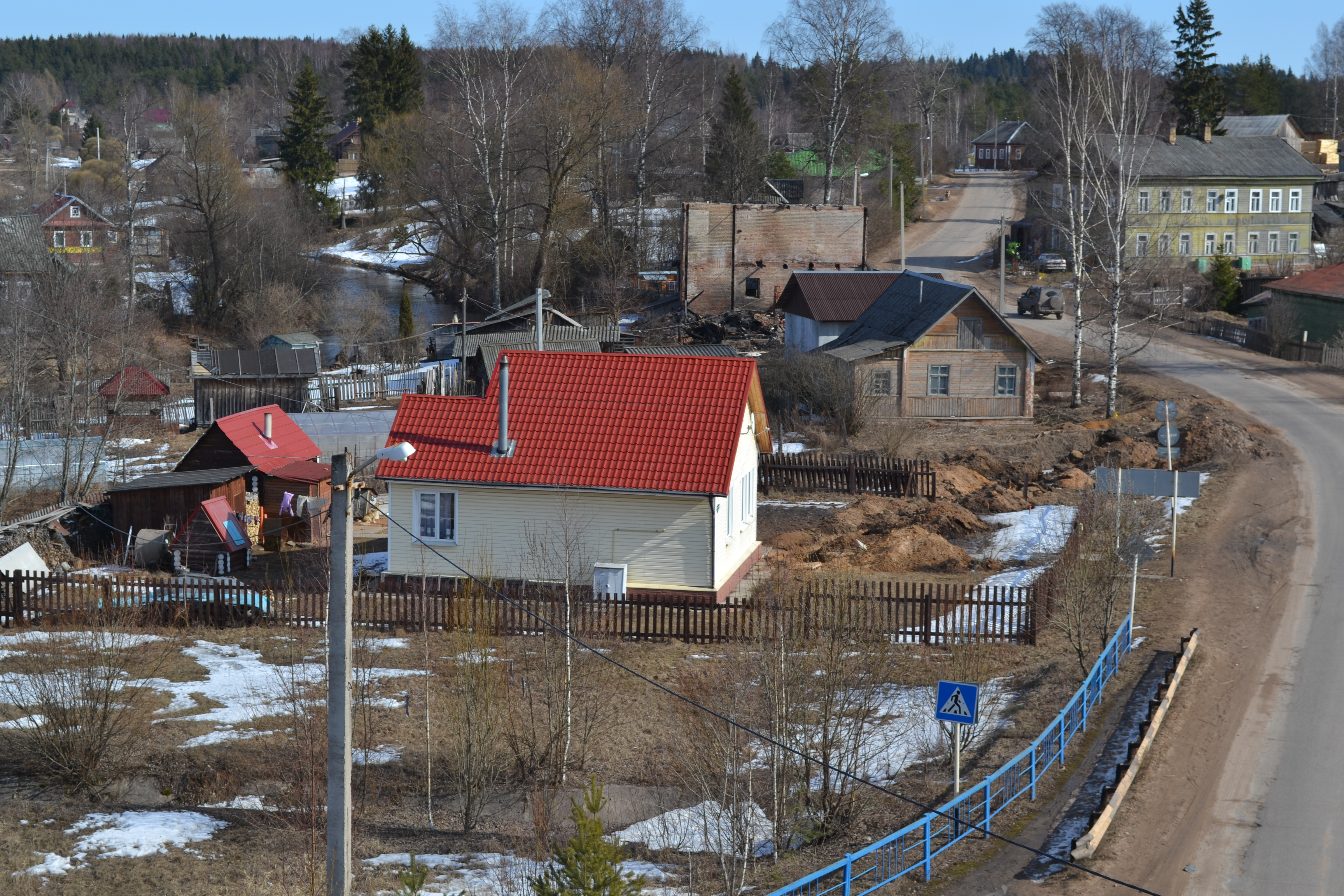 Памятное место, где стоял дом, в котором в 1890-х гг. жила Л.М. Книпович и у которой периодически проживала Н.К. Крупская: улица Коммунарская, Лыкошино, Бологовский район, Тверская область